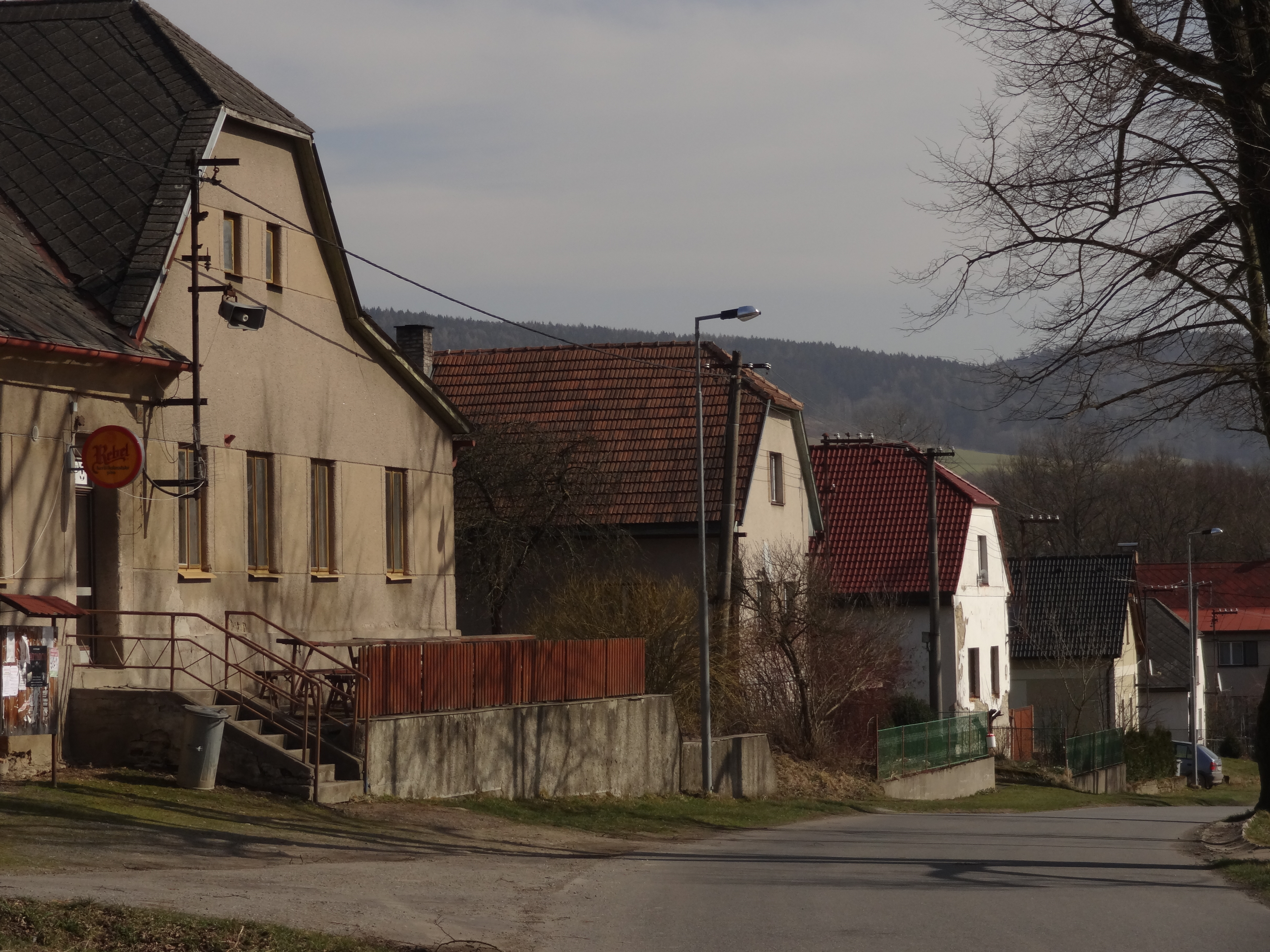 Víska u Chotěboře - čp. 18 (nejblíže), 19, 40 a 21